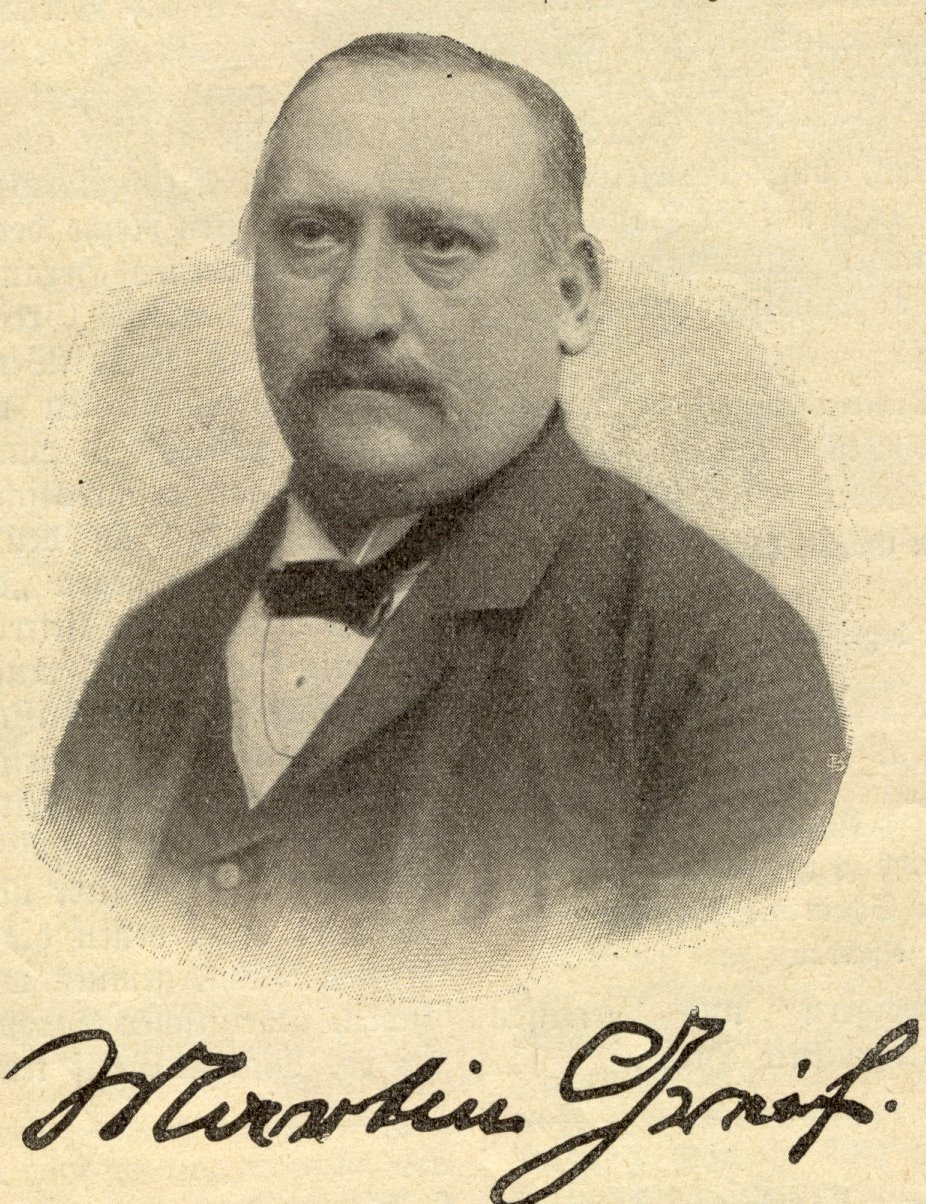 Martin Greif 1898